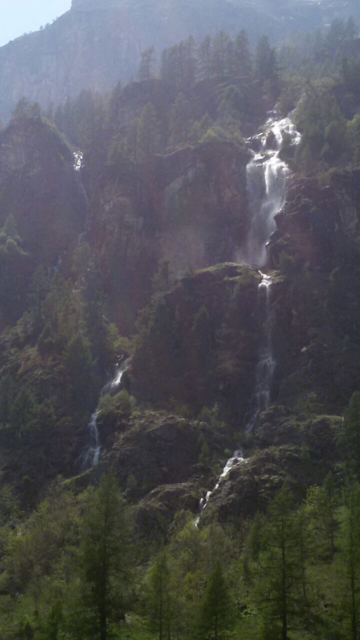 Gressoney-La-Trinité - Cascades - Vallée d'Aoste